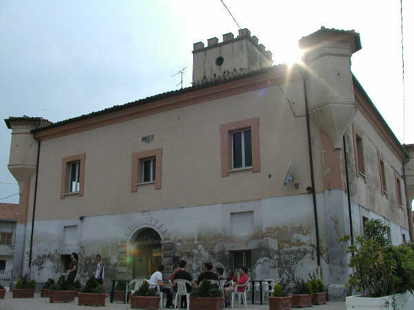 Fotografia di Brecciarola (Chieti). Il Casone. Fotografia personale anno 2003